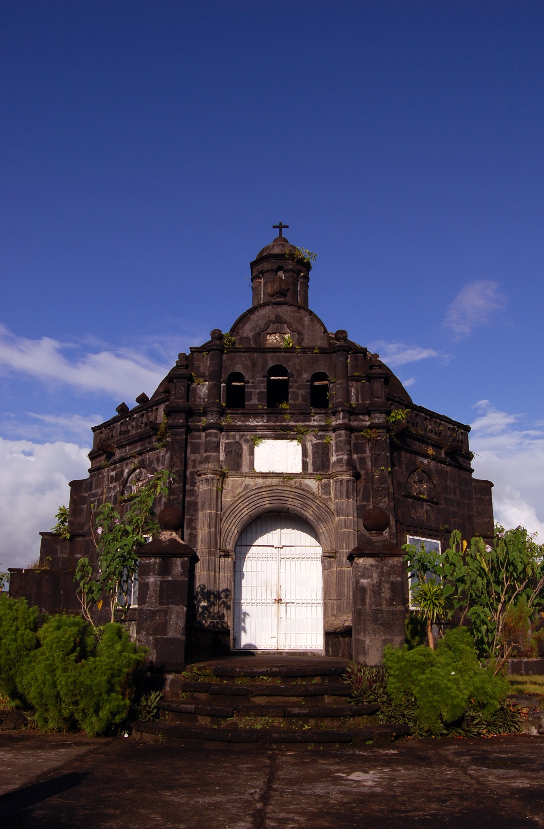 Nikon D40 (Tabaco City CBMS Training, April 2008).